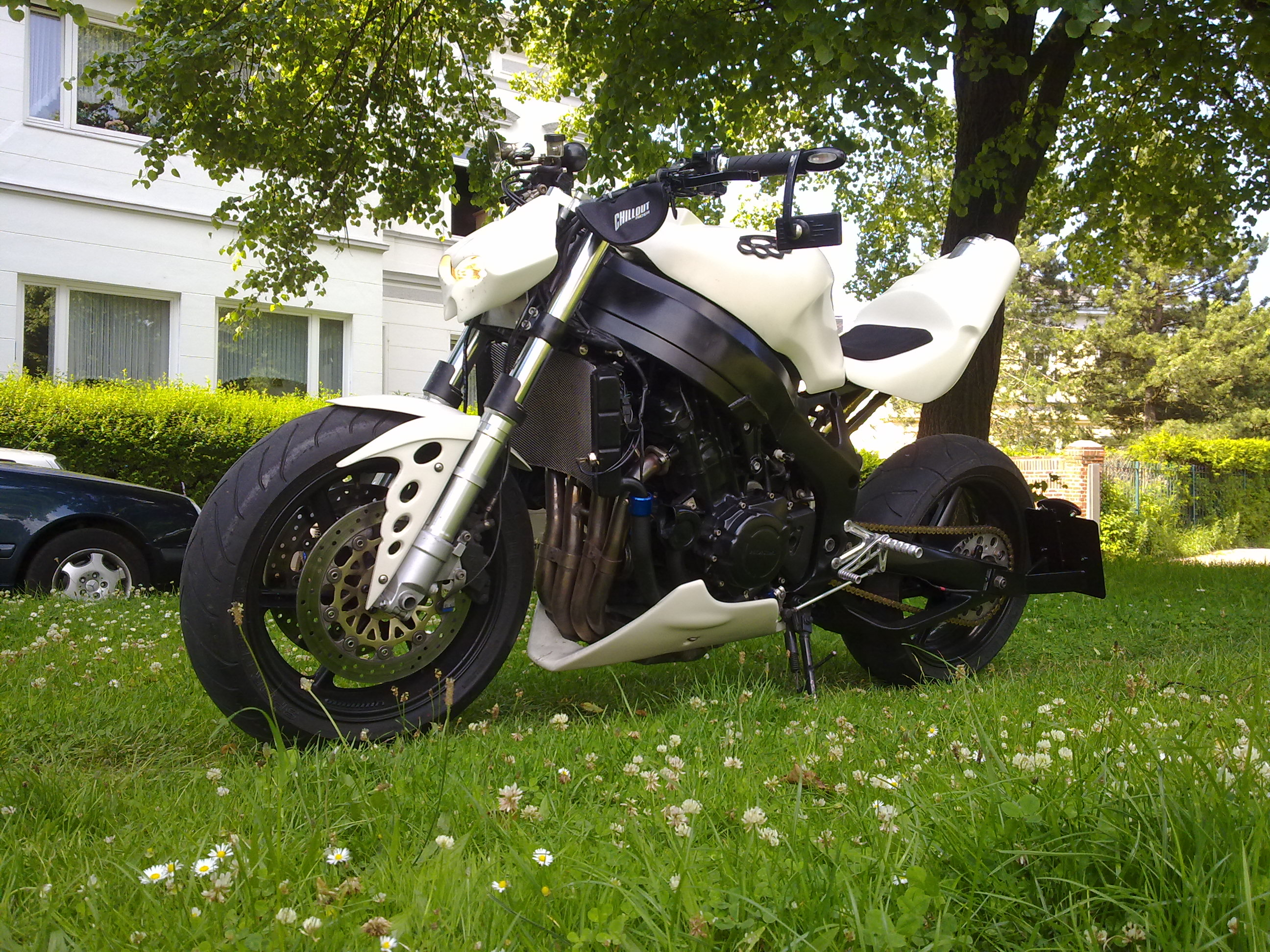 Honda CBR 900 rr SC 33 Bj 1996